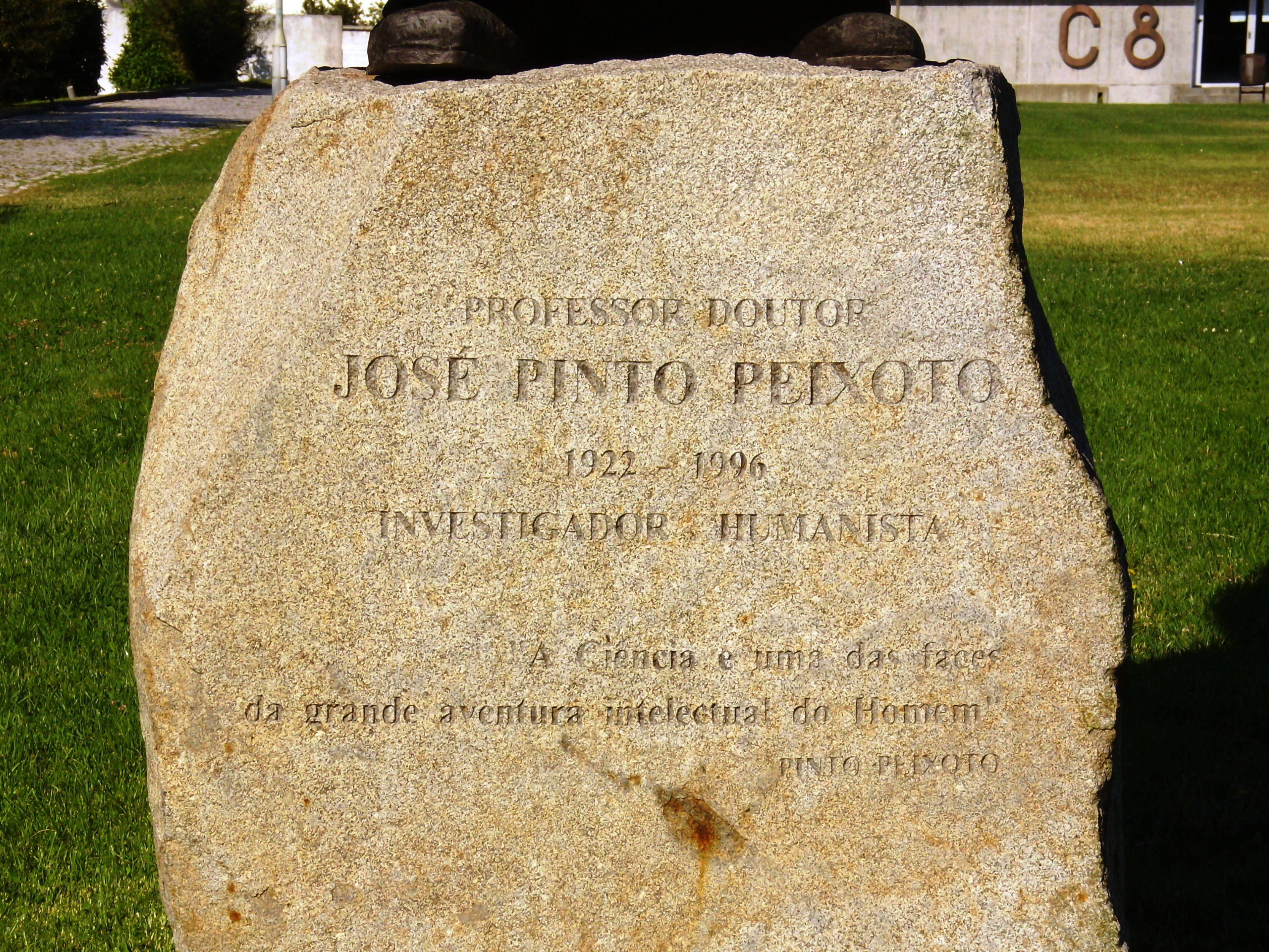 Prof. Dr. José Pinto Peixoto (1922-1996), estátua na Faculdade de Ciências da Universidade de Lisboa, Campo Grande, Lisboa, Portugal: detalhe da placa.